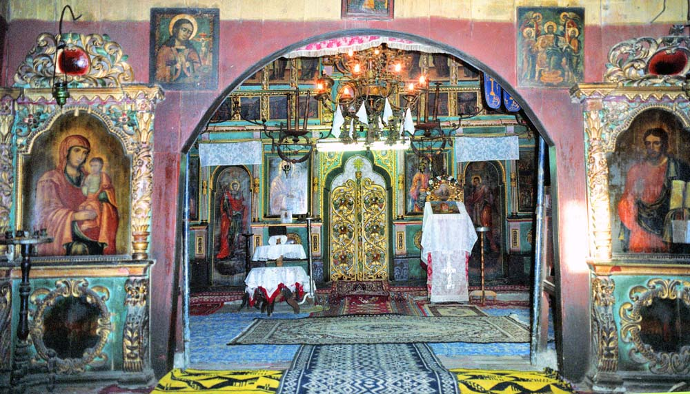 Biserica de lemn din Corjăuţi, interior, spre iconostas.